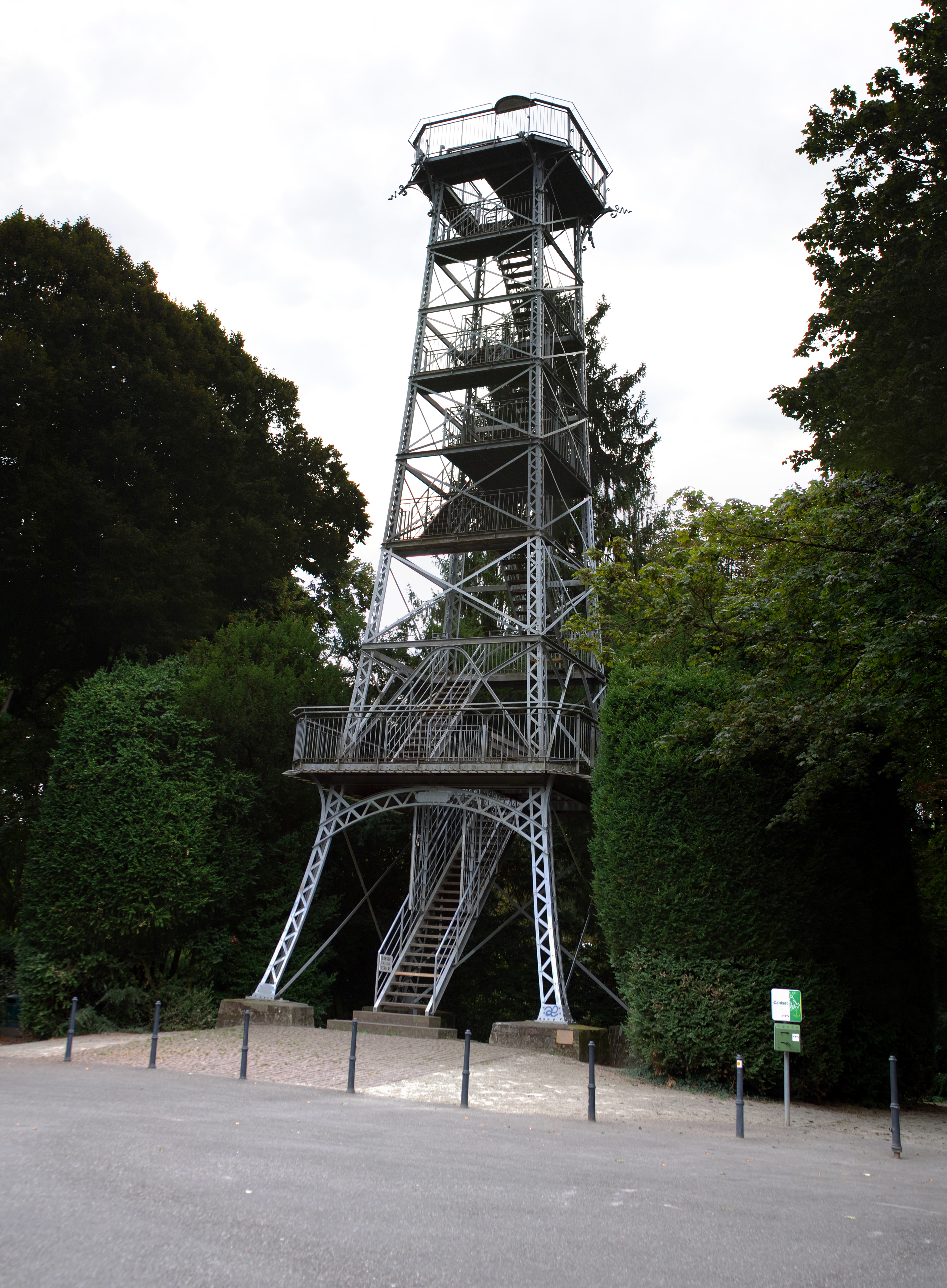 Tour du Belvédère, Mulhouse